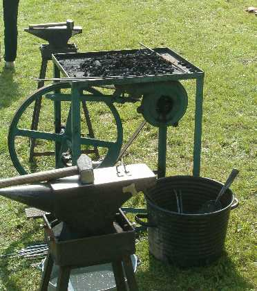 En feltesse var smedens mobile esse, som han tog med, når han arbejdede væk fra smedjen, i felten. Denne feltesse er dog en moderne esse til brug i sløjdundervisningen. Den er flankeret af to ambolte, og der står en spand vand til afkøling/hærdning af emner. Fotograferet ved Værkstedsdagene i Hørsholm i 2006 af sløjdlærer Hans Christophersen.